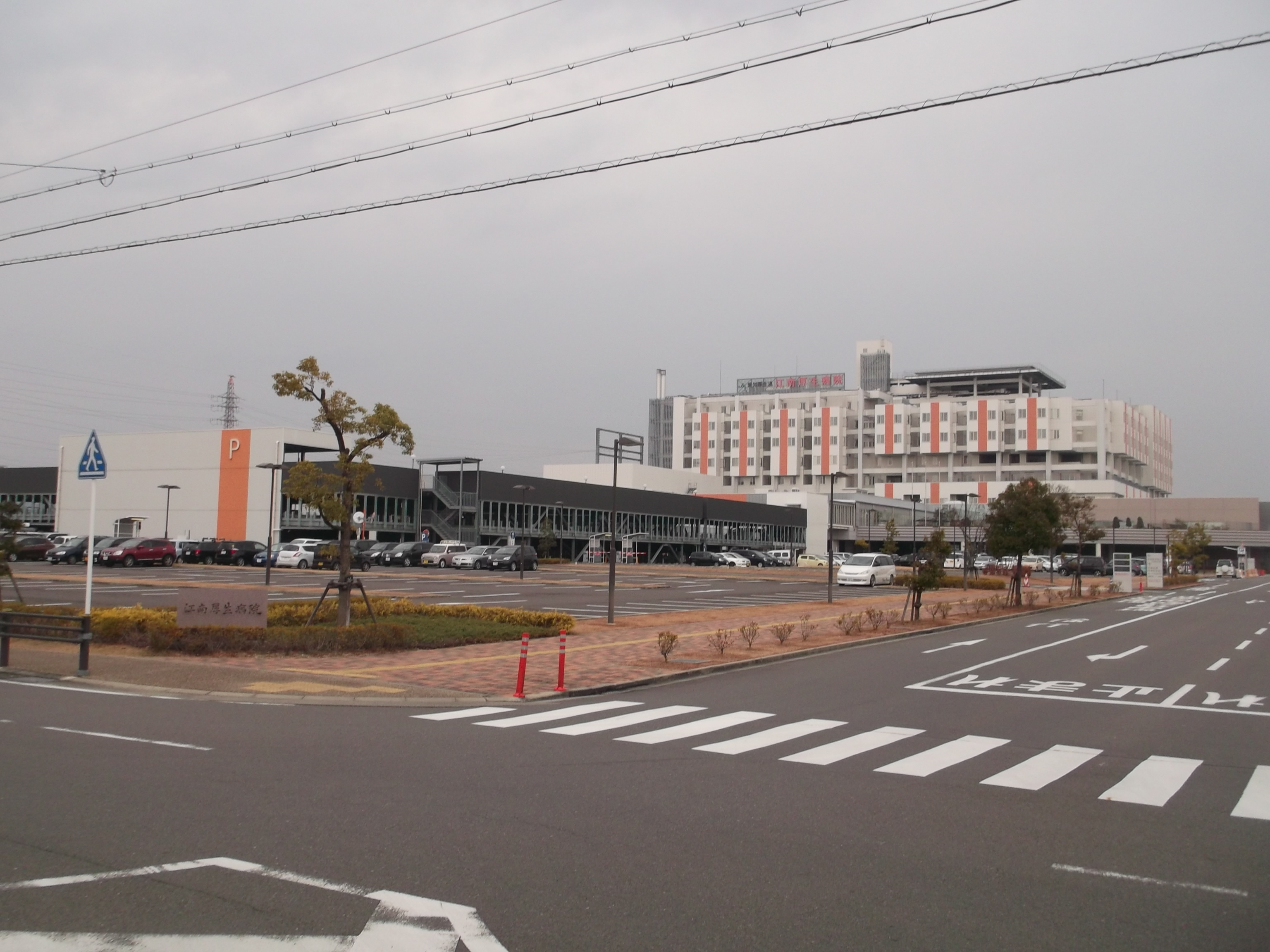 愛知県厚生農業協同組合連合会 江南厚生病院